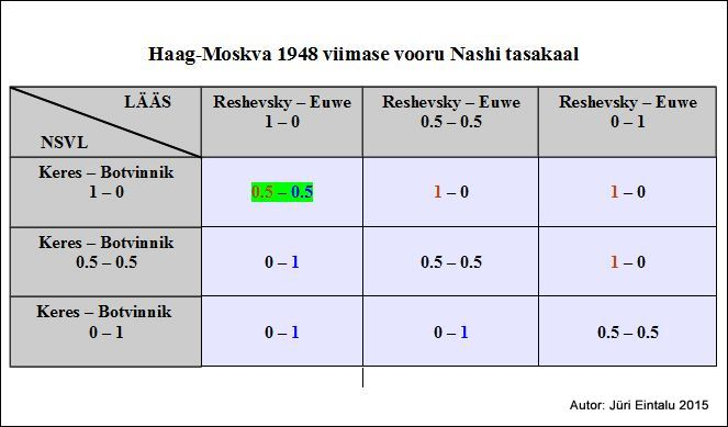 HAAG-MOSKVA 1948 VIIMANE VOOR. Nashi tasakaal koalitsioonidele NSVL ja LÄÄS.